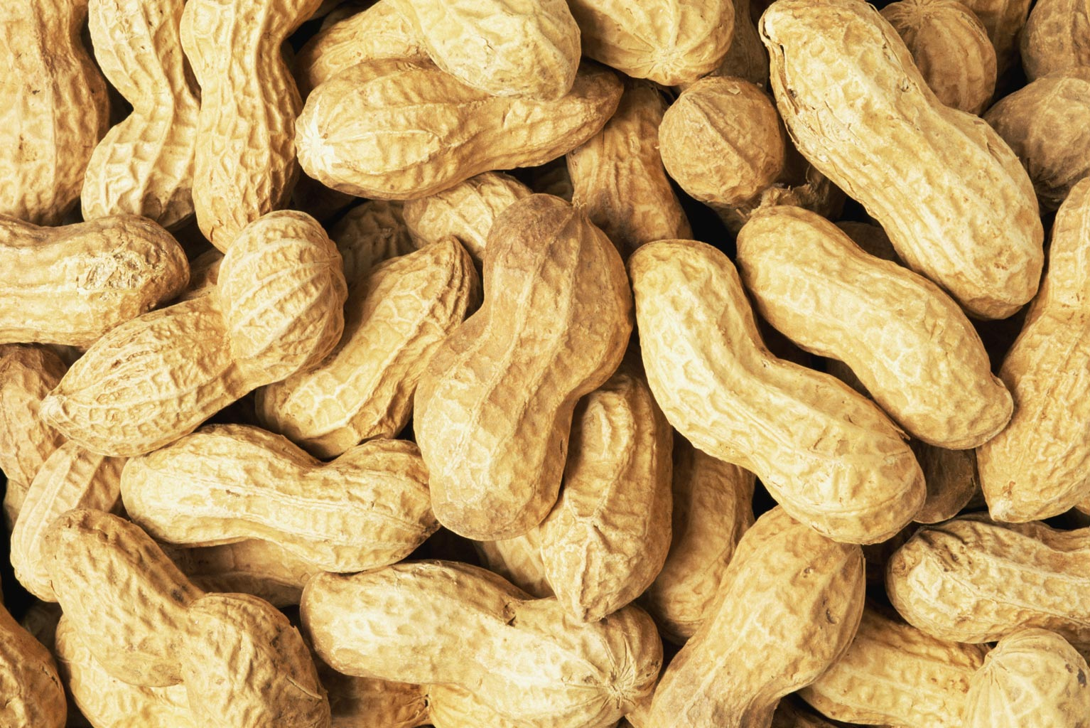 Bahçe, Osmaniye'den bir görünüm.